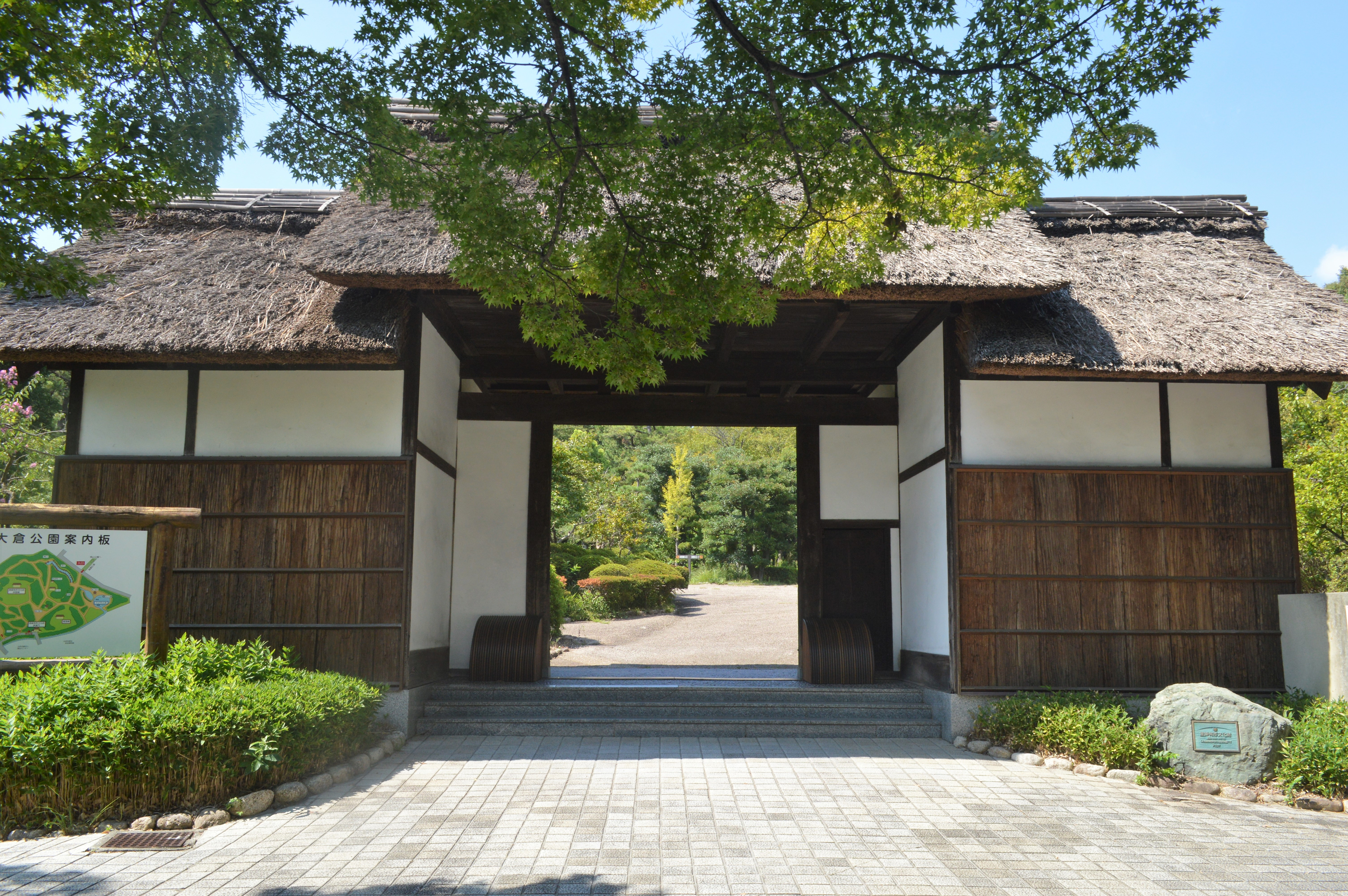 愛知県大府市の大倉公園。登録有形文化財に登録されている茅葺門。